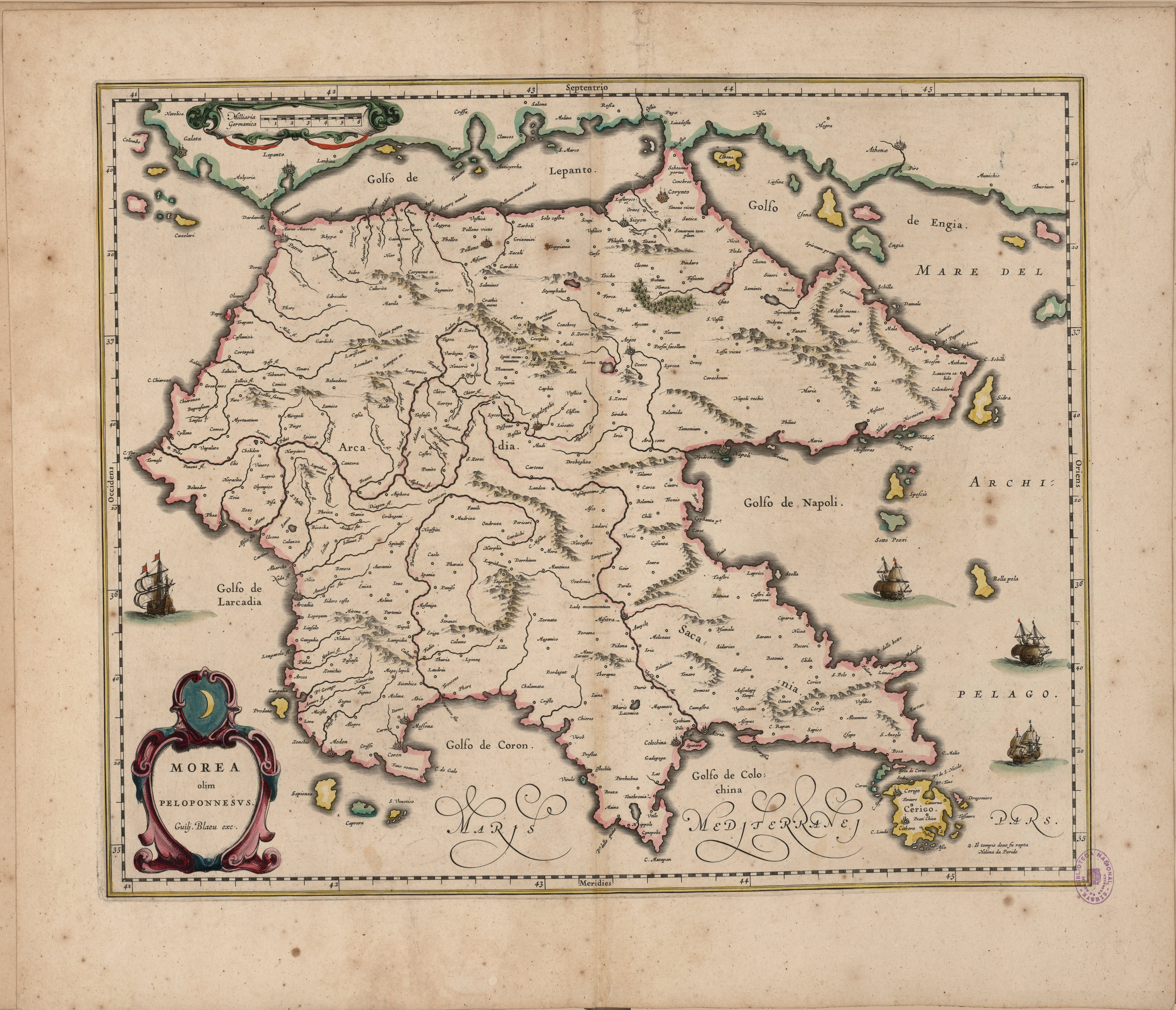 Morea olim Peloponnesus (Moerbeiland)